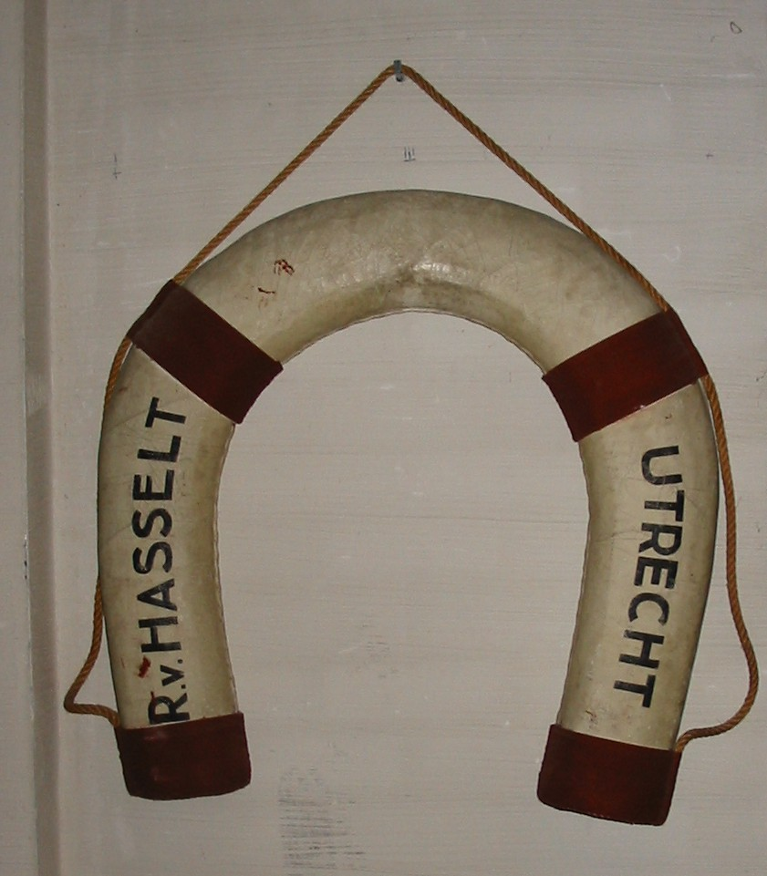 Reddingsboei van de voormalige ss R. van Hasselt in het Spoorwegmuseum te Utrecht